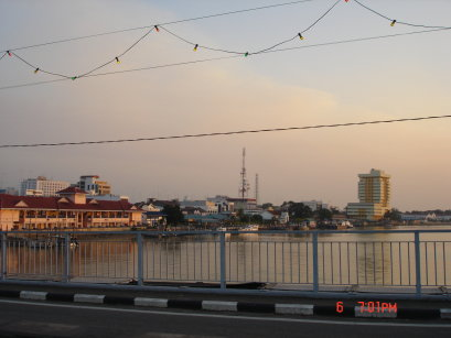 DESCRIPTION: MUAR SEA VIEW SOURCE:OWN DATE: 2005 TAKEN BY LIM THIAM POH